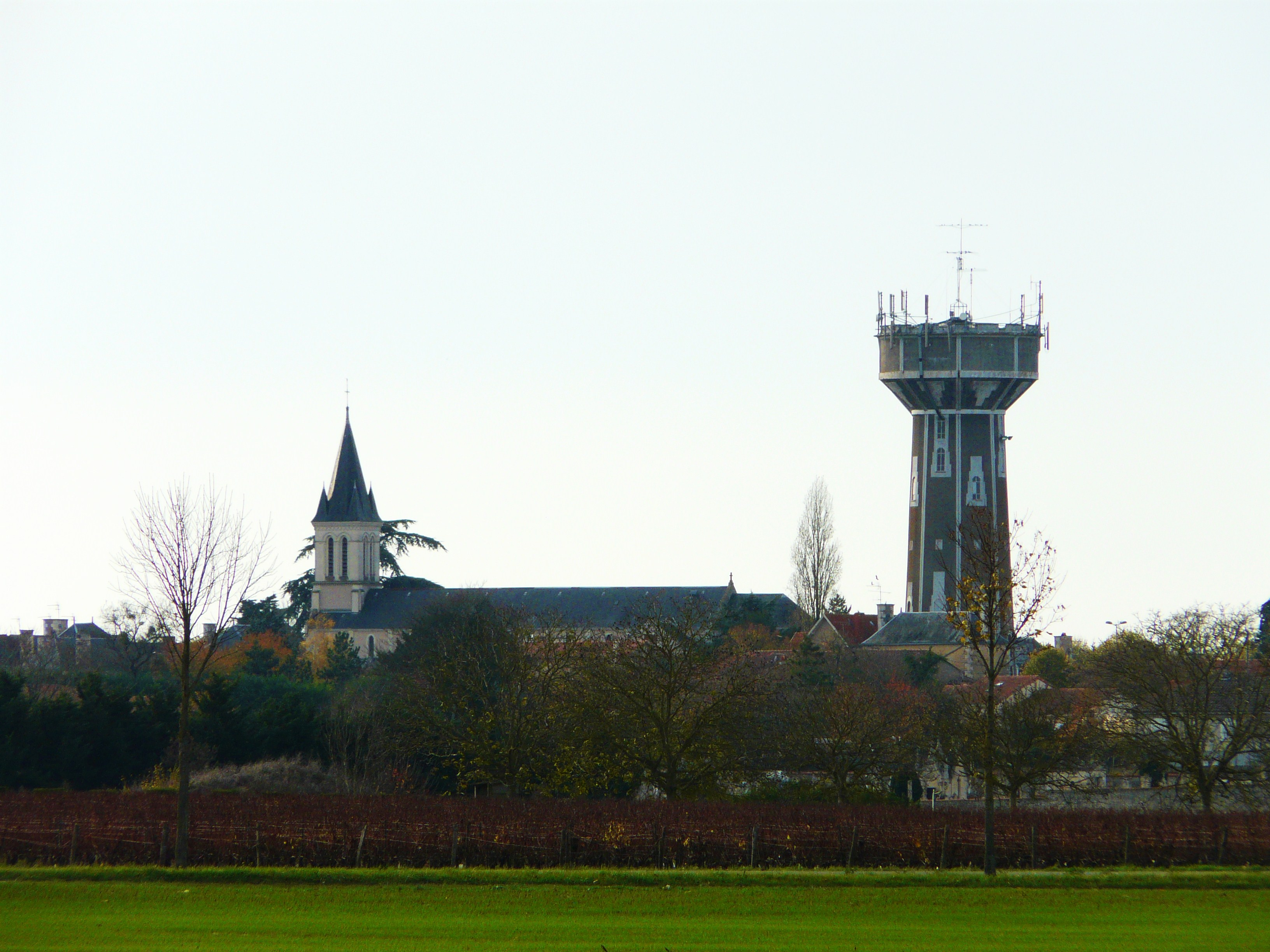 L'église Notre-Dame et le château d'eau, Neuville-de-Poitou, Vienne, France